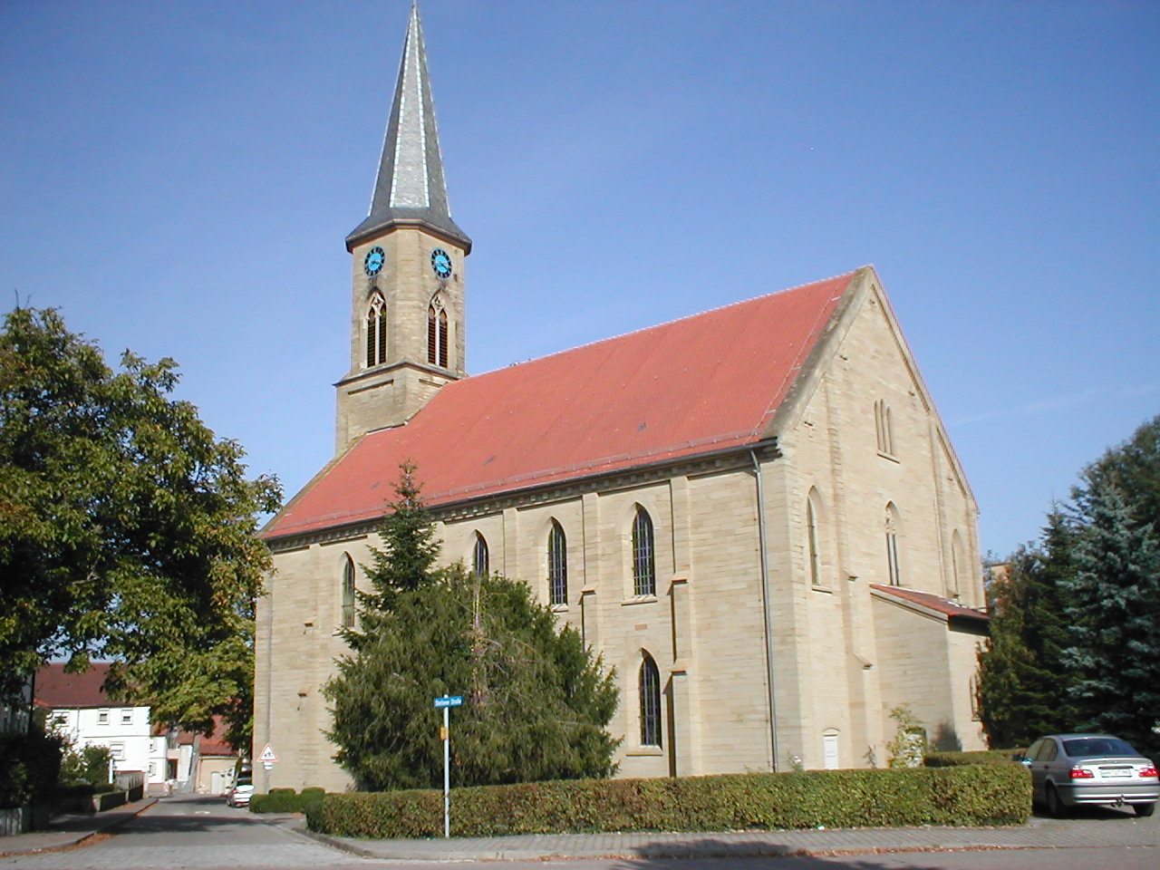 Evangelische Kirche in Gemmingen, erbaut 1846/47